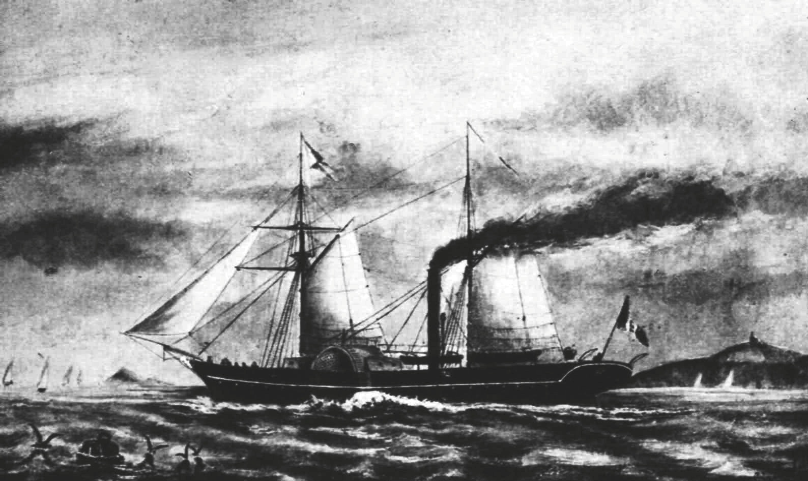 La pirocorvetta a ruote Malfatano